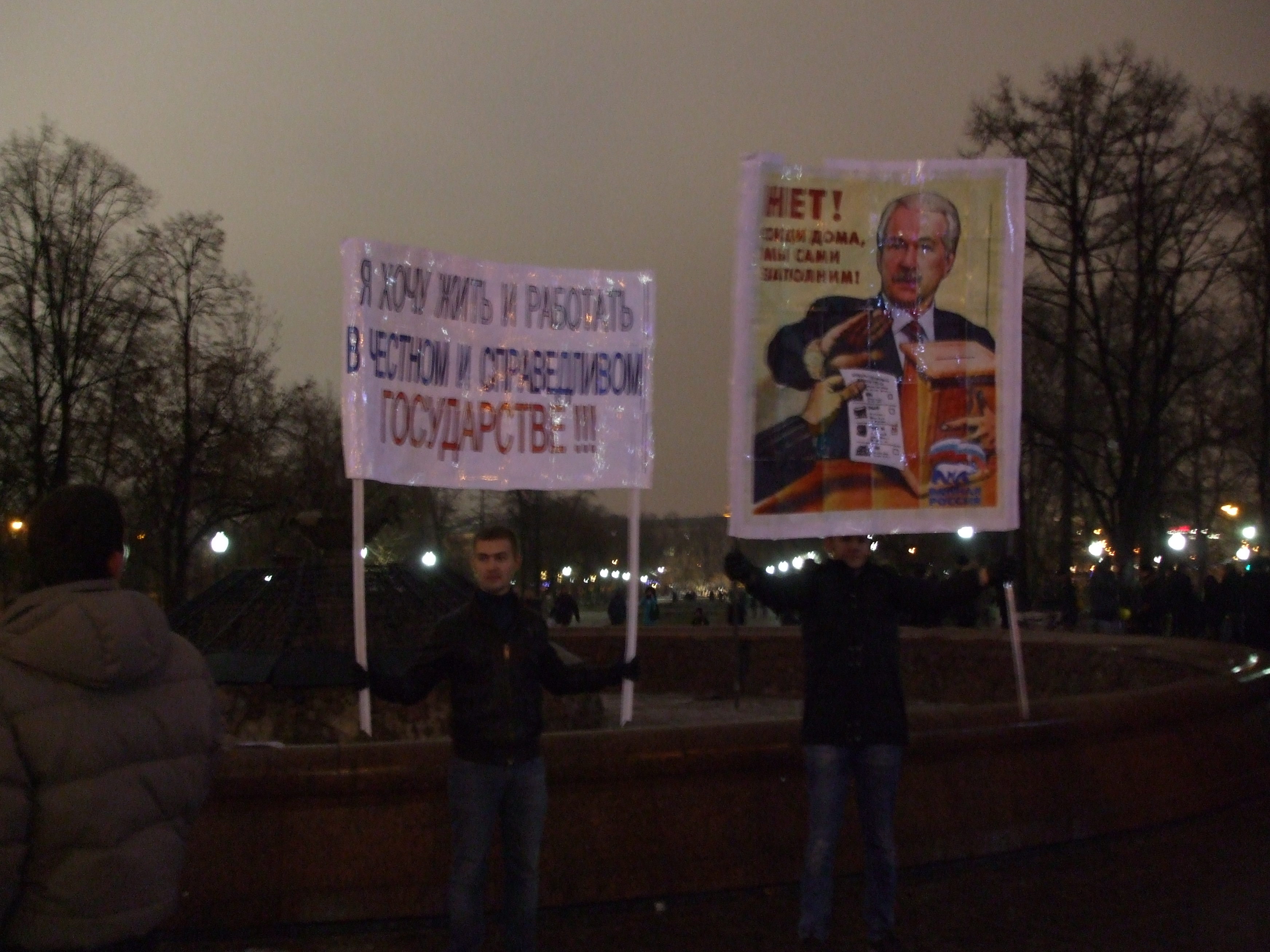 Конец митинга на Болотной площади 10 декабря 2011